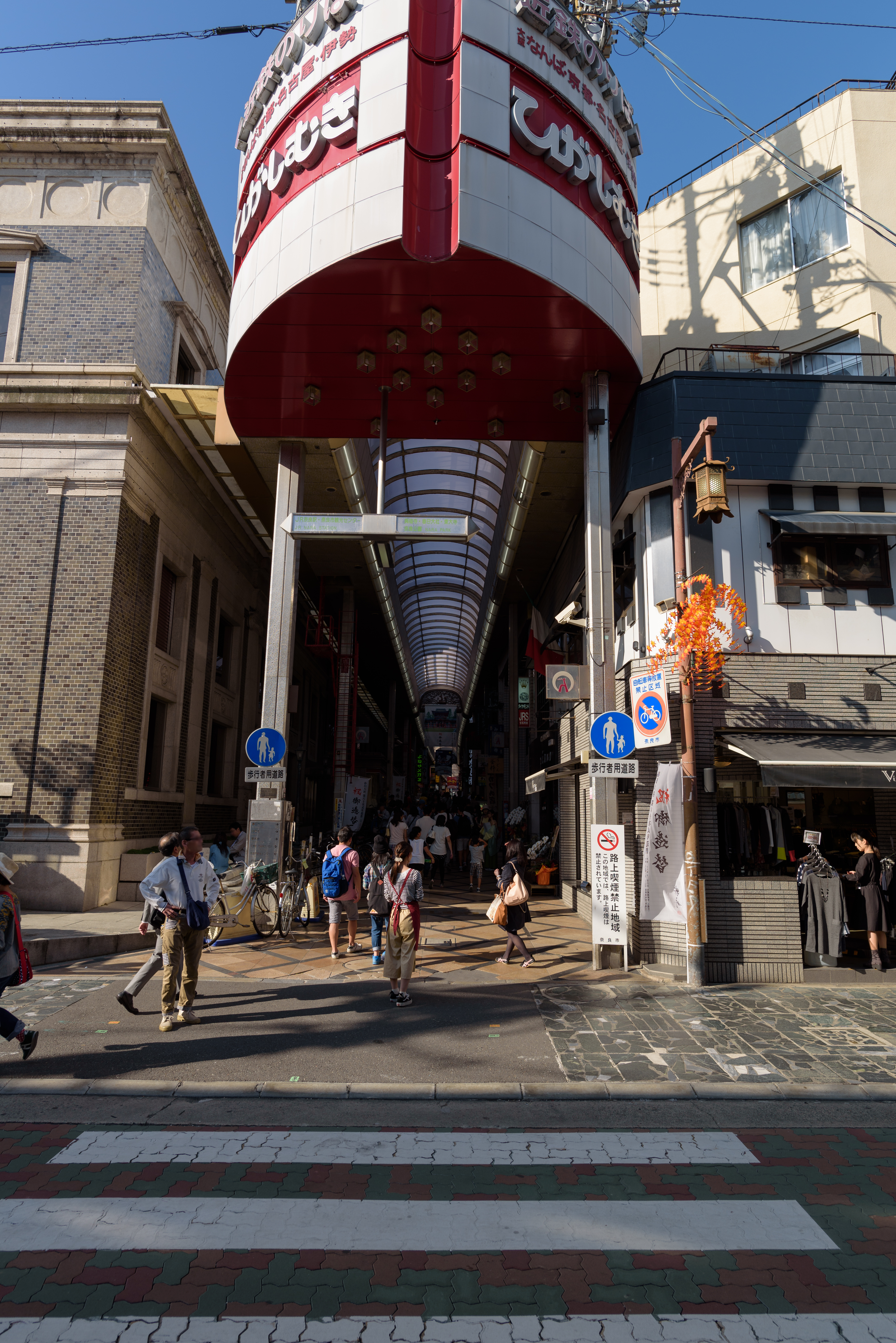 東向通り（奈良市橋本町三条通り側入口）